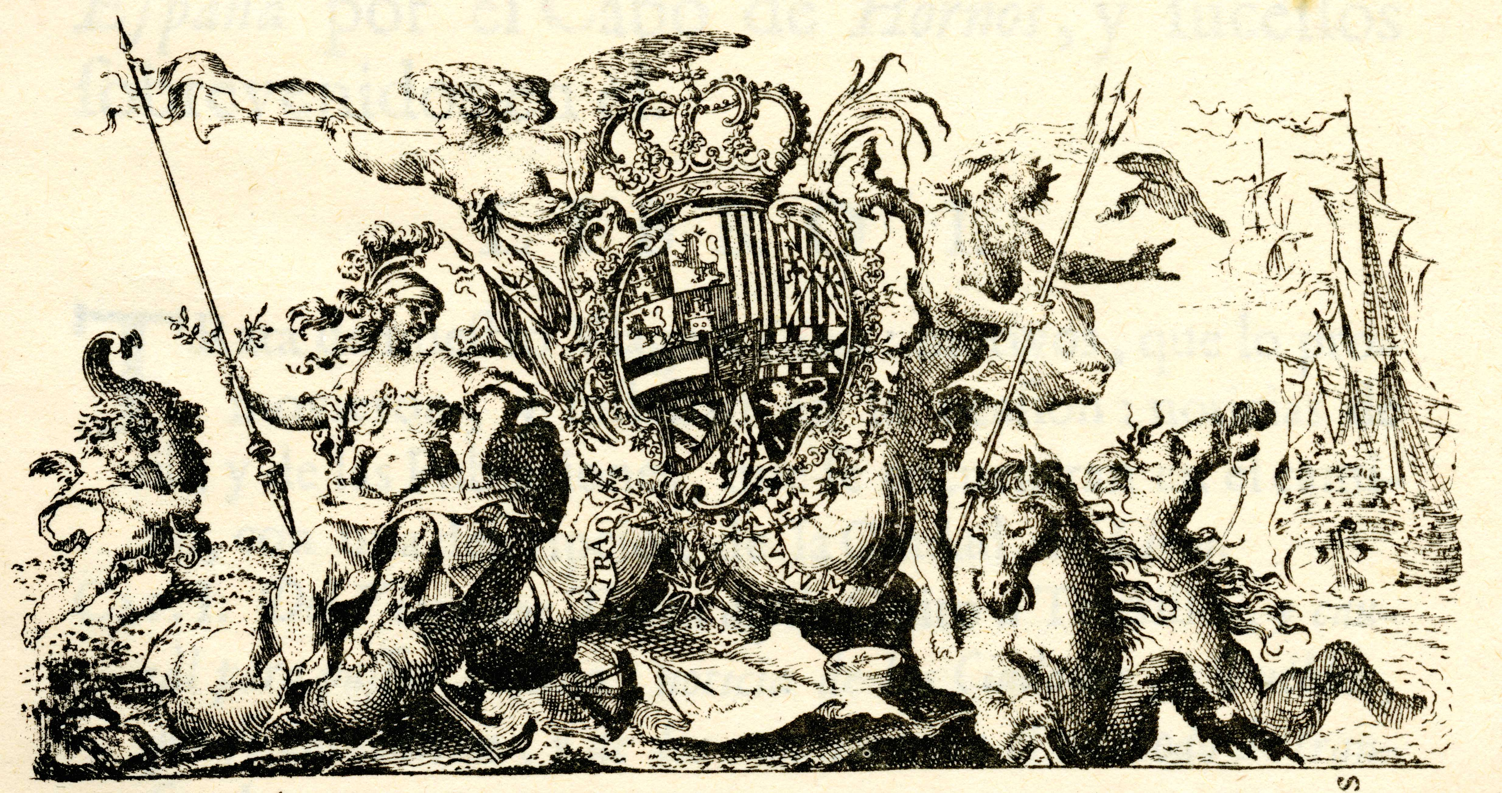 De Ulloa, Antonio y Jorge Juan. Relación Histórica del Viaje a la América Meridional, hecho de Orden de Su Majestad Católica para medir algunos Grados de Meridiano Terrestre, y venir por ellos en conocimiento de la verdadera Figura y Magnitud de la Tierra, con otras varias Observaciones Astronómicas y Físicas. Por Don Jorge Juan Comendador de Aliaga, en la Orden de San Juan, Socio correspondiente de la Real Academia de las Ciencias de París y Don Antonio de Ulloa de la Real Sociedad de Londres: ambos Capitanes de Fragata de la Real Armada. Segunda Parte / Tomo II. Impresa por la Orden del Rey Nuestro Señor en Madrid por Antonio Marín, Año de MCDDXLVIII (1748). Diapositiva de Consulta y acceso publico cuya información fue investigada de un libro y/o ejemplar de revisión custodiado en los Fondos Bibliográficos (Sección Siglo XVIII o Etapa Colonial) del Archivo Histórico del Guayas; Guayaquil, Ecuador